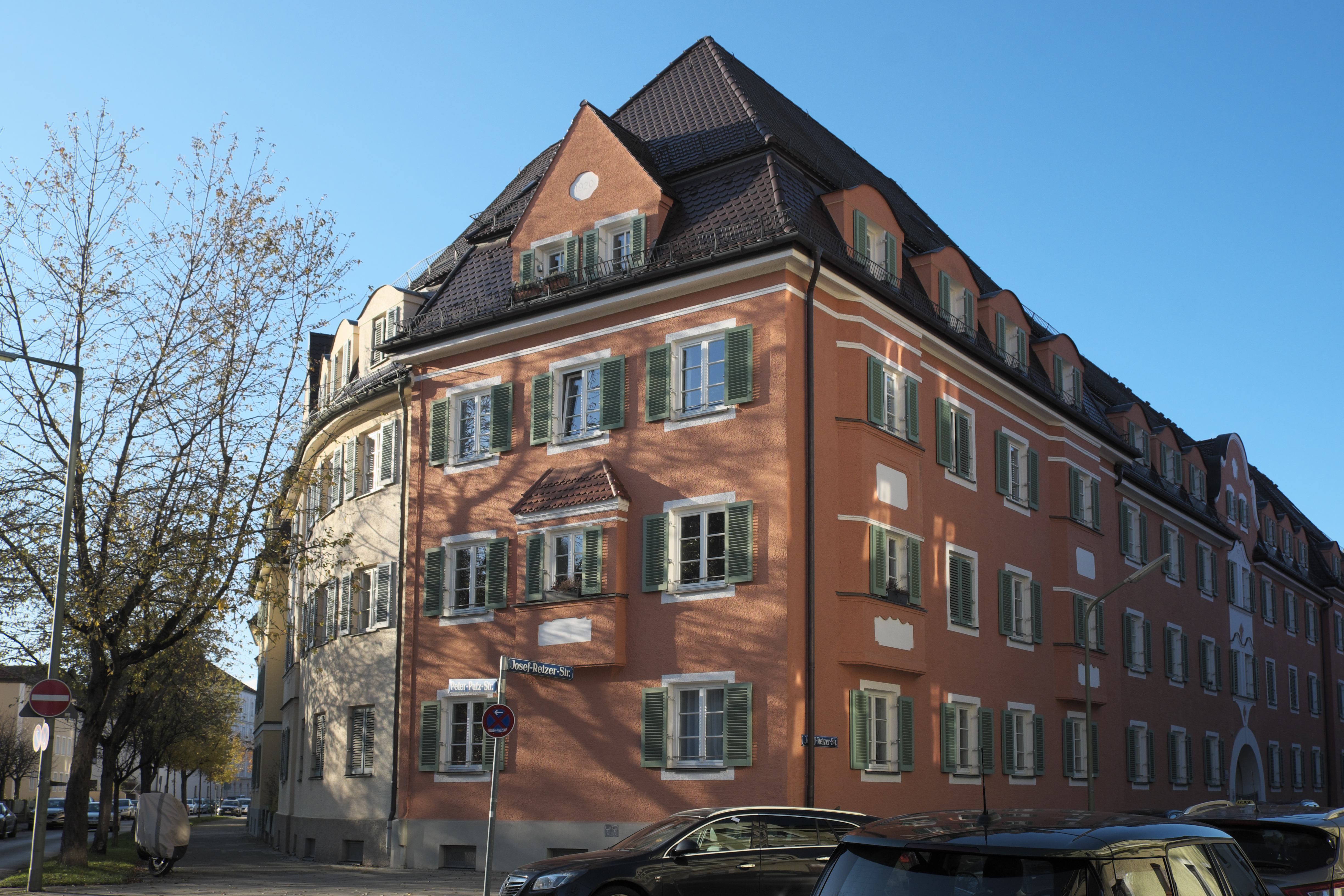 Arbeiterheim, Josef-Retzer-Straße 49/51/53/55, in Pasing im Stadtbezirk Pasing-Obermenzing in München (Bayern/Deutschland), 1920 bis 1925 von Ludwig Zeller (Nr. 49) und den Gebrüdern Ott erbaut